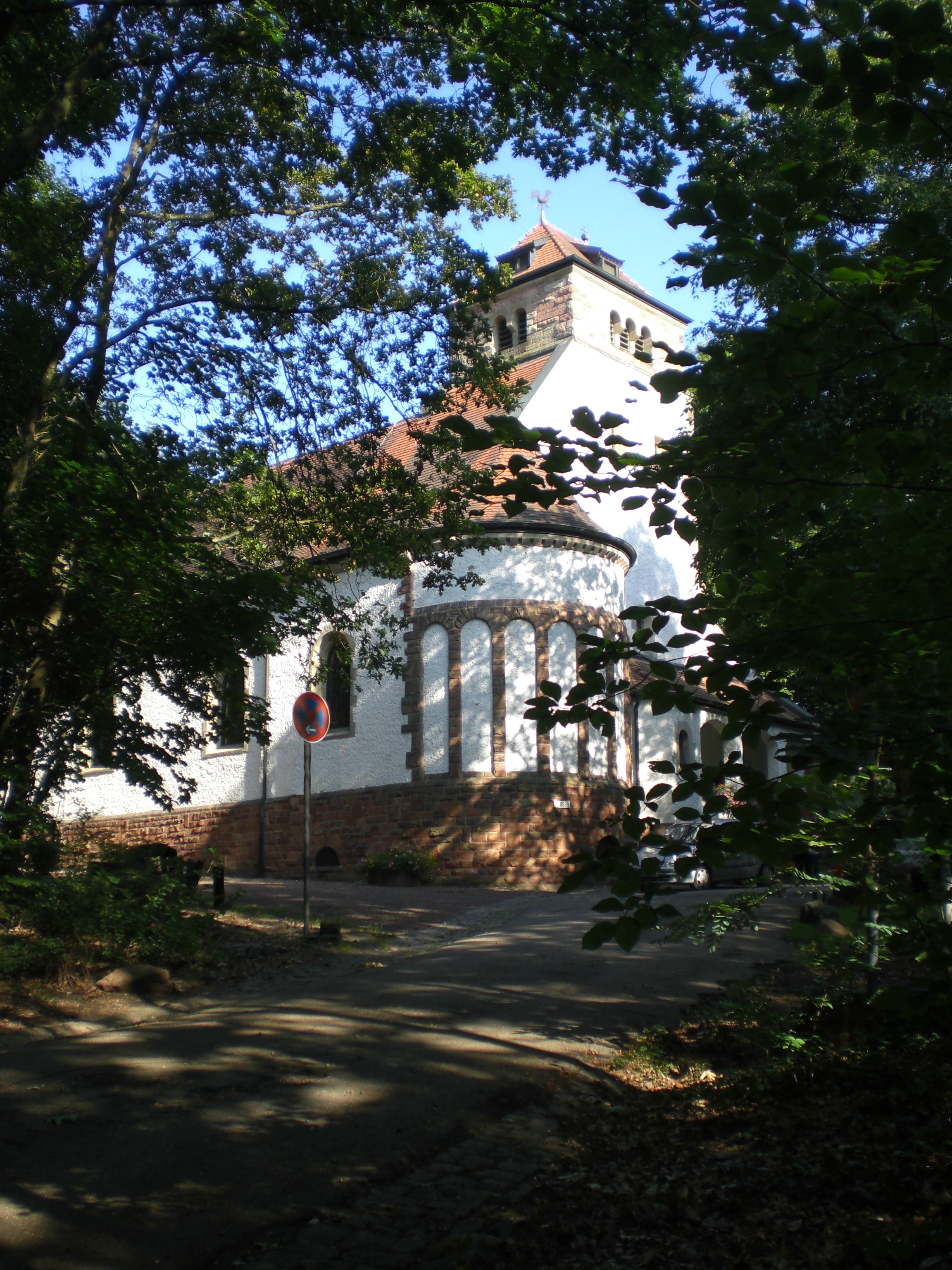 Frontansicht mit Turm der Klinikkirche Homburg